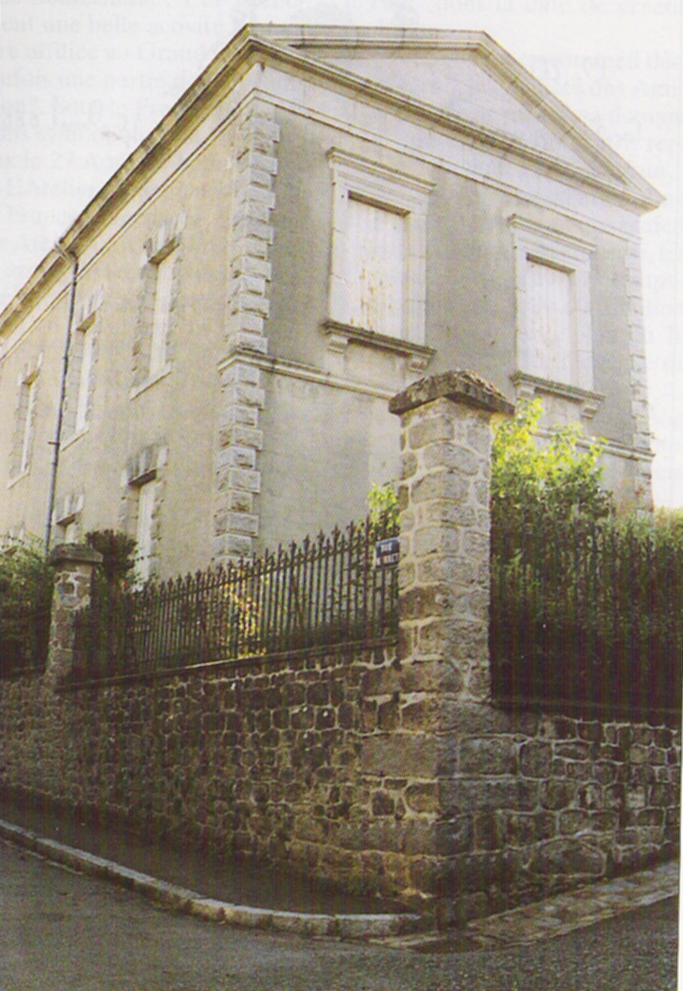 Photographique de la loge maçonnique de Guéret